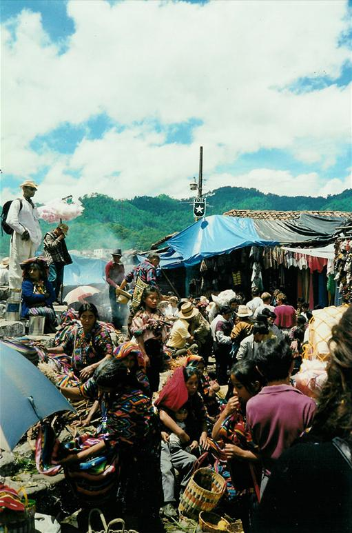 Chichicastenanago - Guatemala, 1995